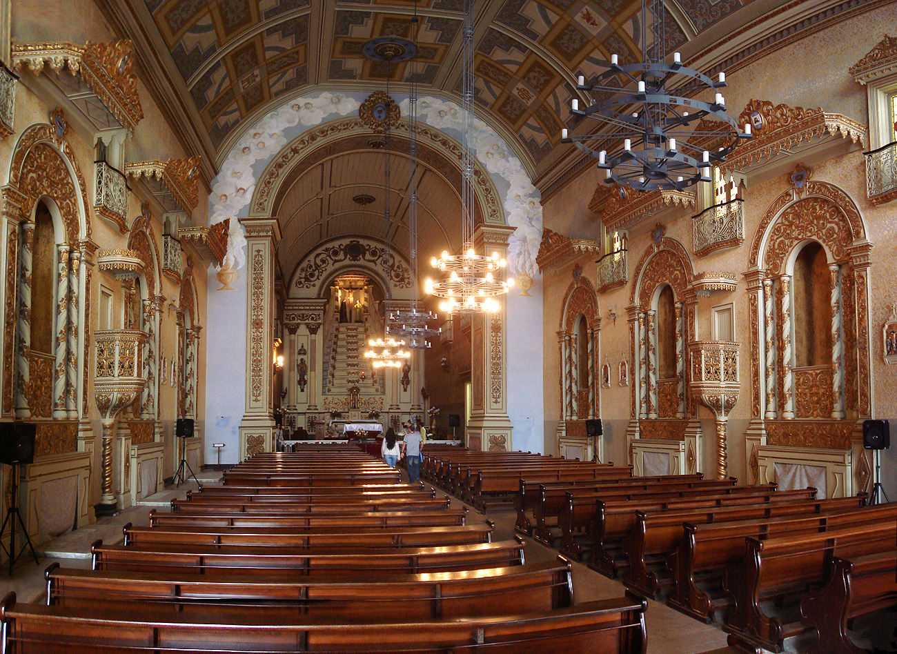 Interior da Igreja das Dores, Porto Alegre, Brasil.